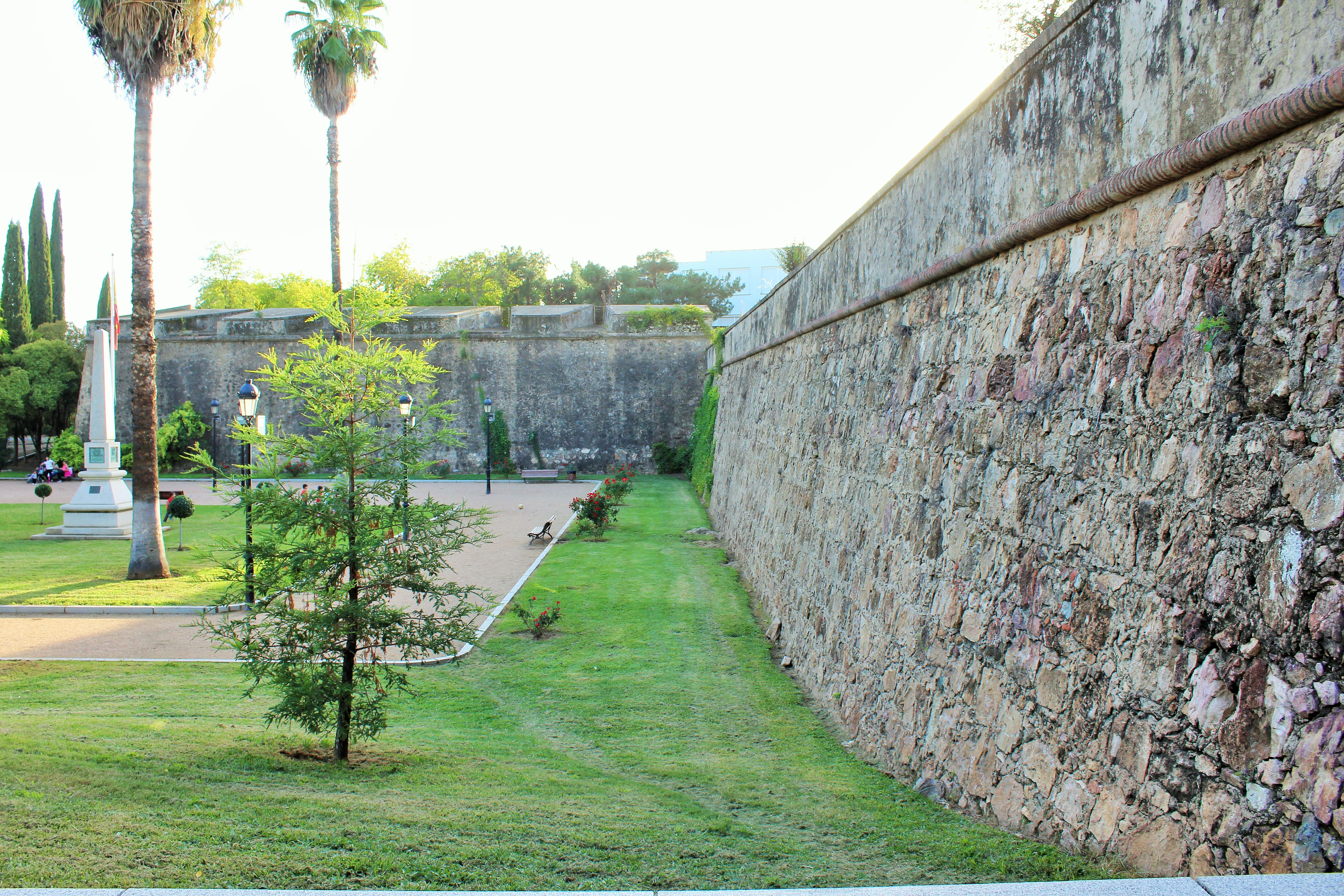 Lienzos con parque y monolito s los caídos en la Guerra de la Independencia.